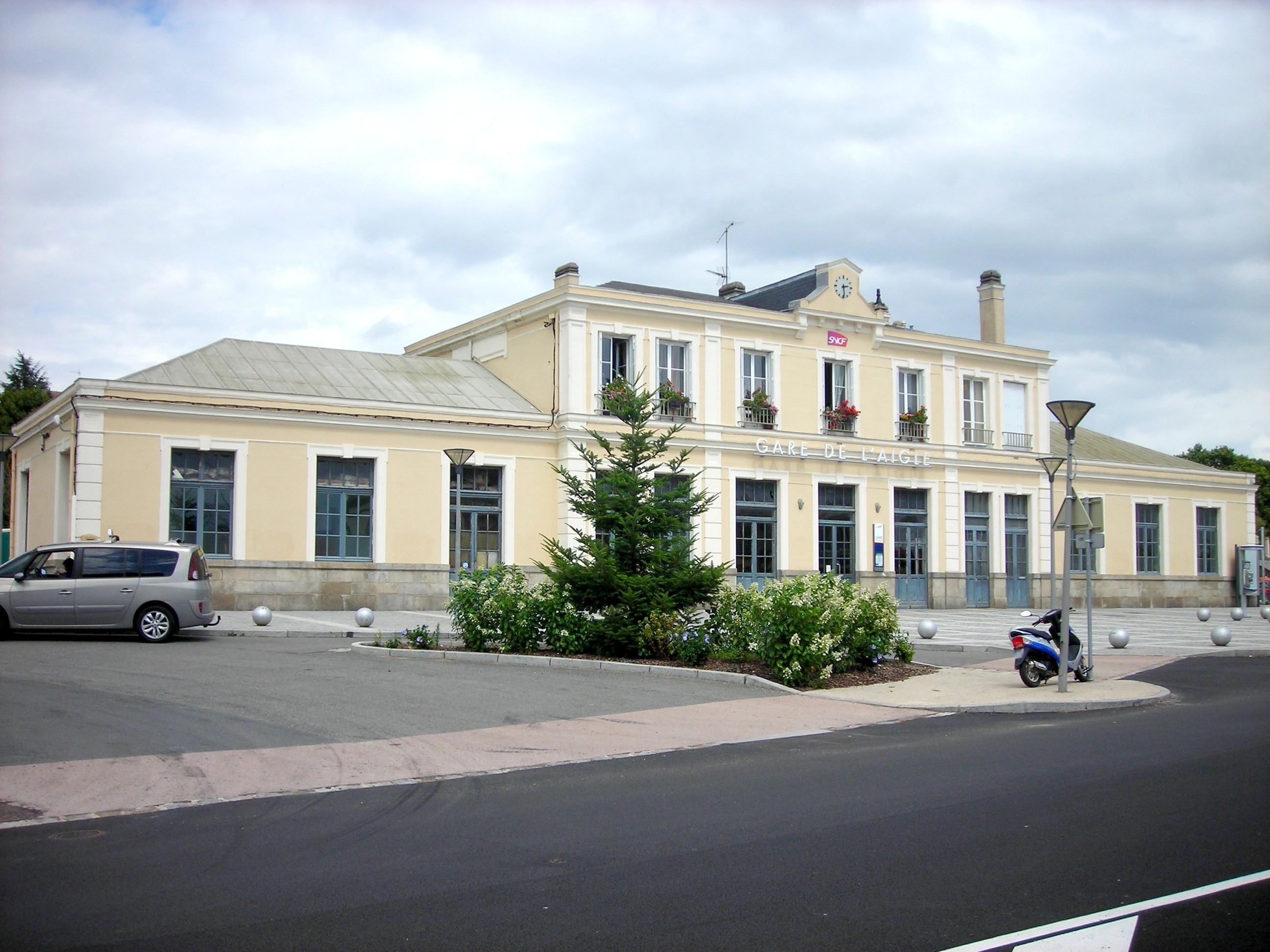 Gare de l'aigle (Orne, France)